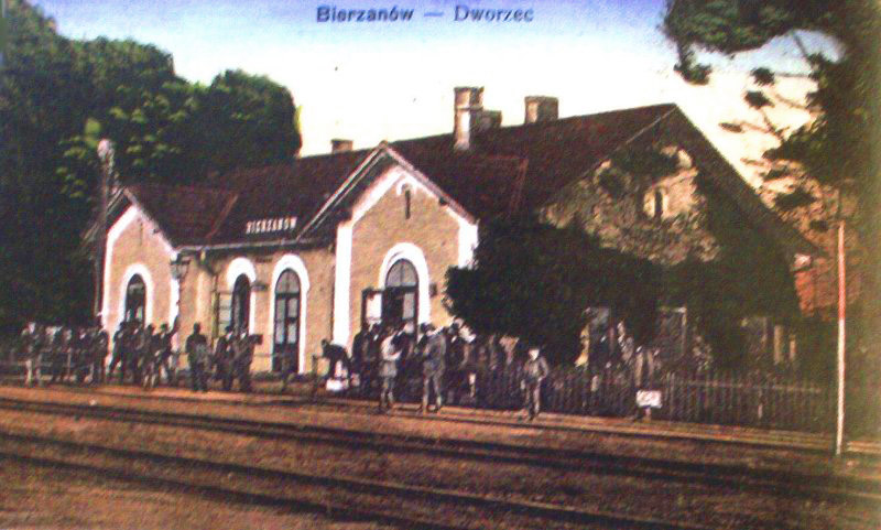 Dworzec na historycznej pocztówce. W tym okresie tj. na przełomie XIX i XX w. przeżywał swoją świetność. Kolorystyka elewacji typowa dla budynków państwowych w krajach Monarchii Austro - Węgierskiej.